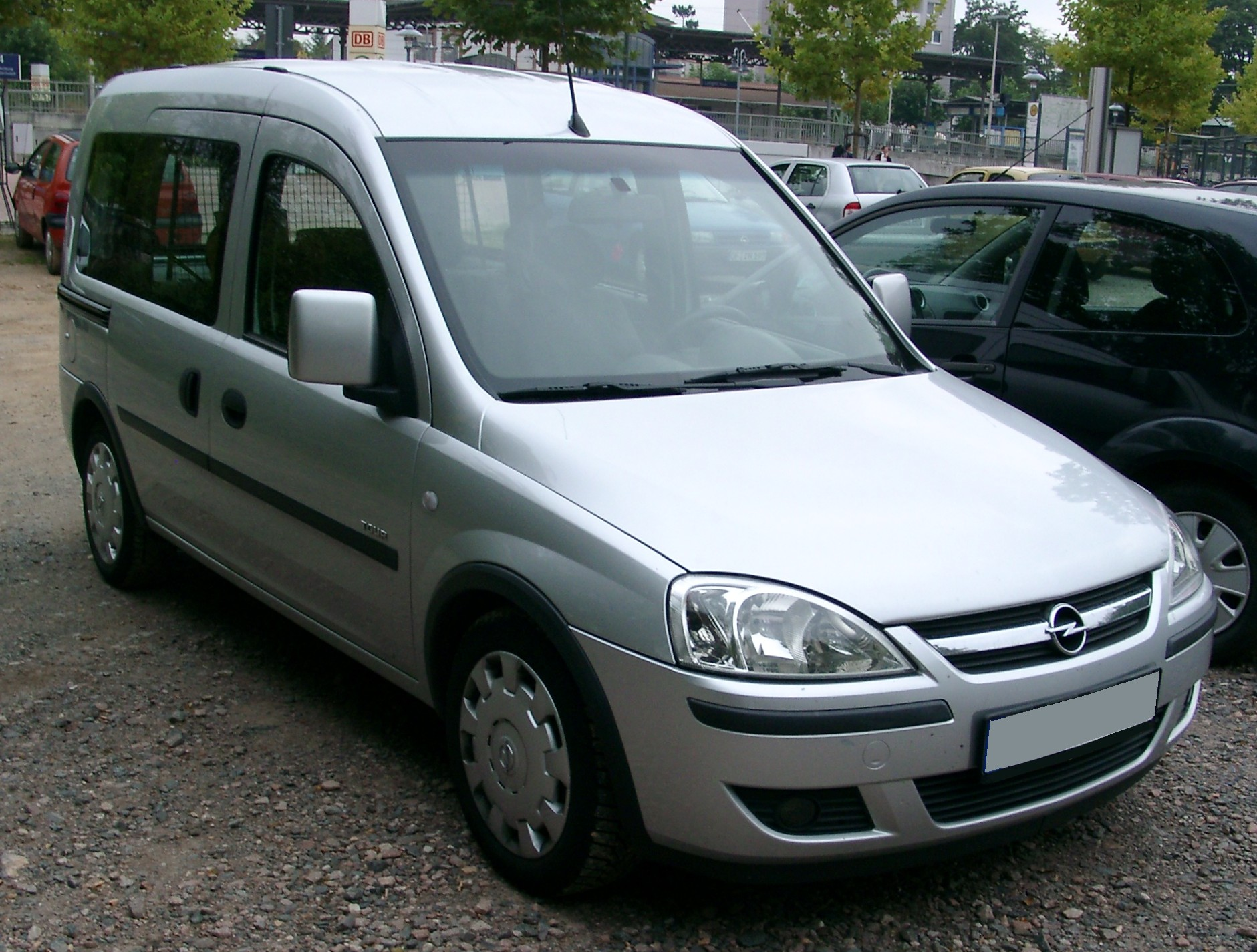 Opel Combo